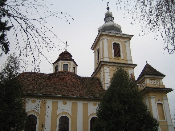 St. Petrus- und Paulus-Kirche in Sibiu (Hermannstadt), erbaut zwischen 1778-1788. St. Petrus- und Paulus-Kirche in Hermannstadt.